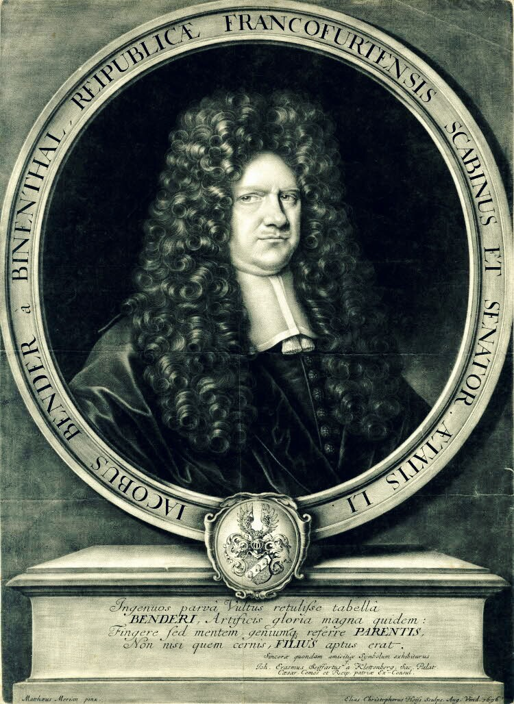 Jacob Bender von Bienenthal (1644–1695), Frankfurter Schöff, Ratsherr und Diplomat, im Alter von 51 Jahren